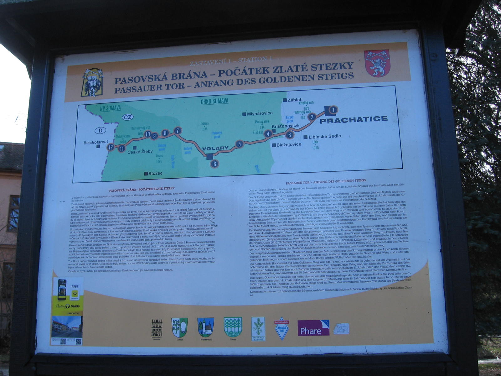 Štěpánčin park v Prachaticích